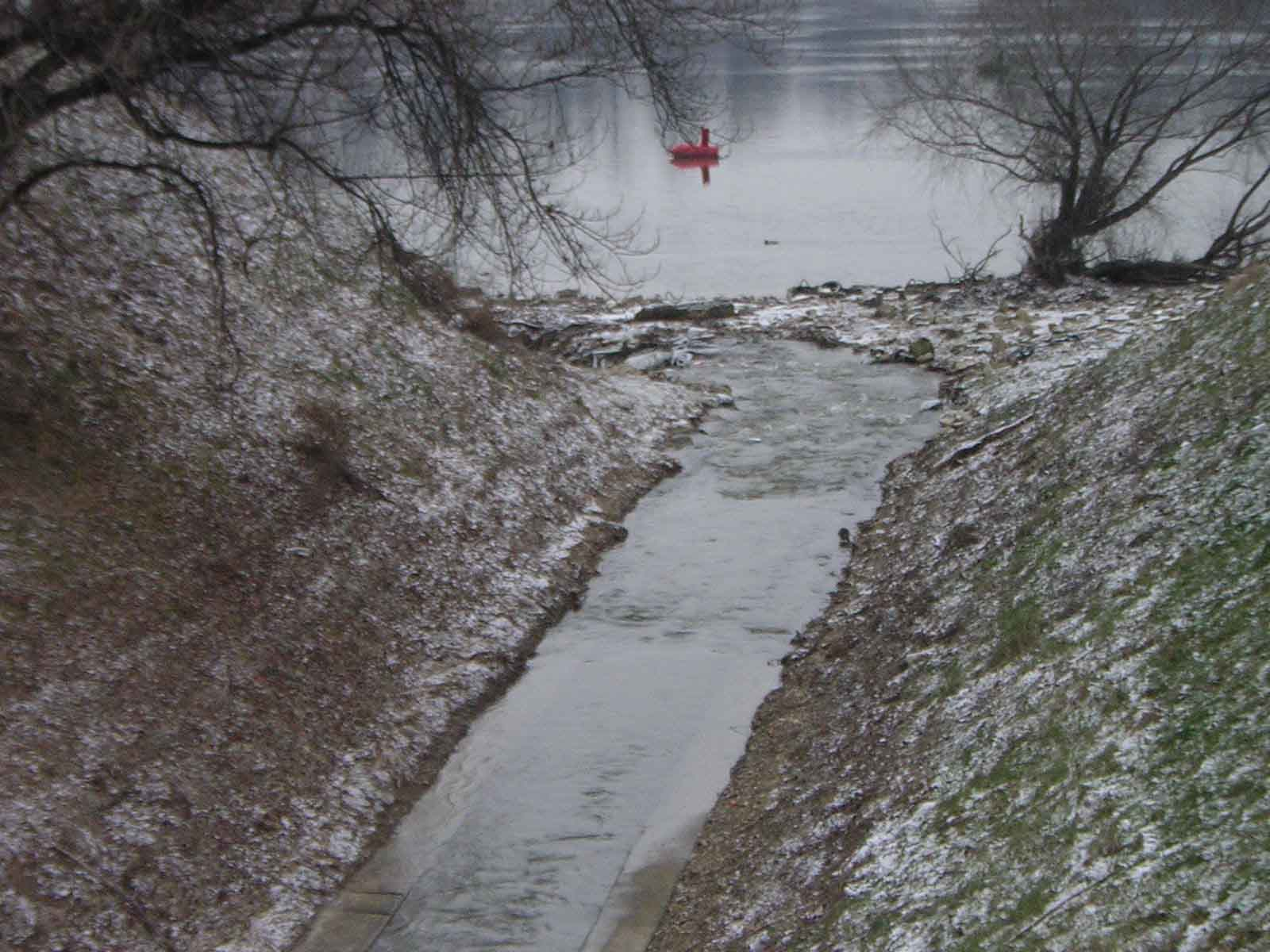 Aranyhegyi-patak beleömlik a Dunába Budapestnél, az Újpesti vasúti híd mellett